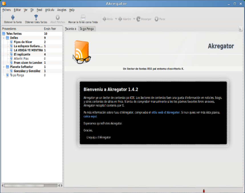 Pantalla de portalada d'Akregator